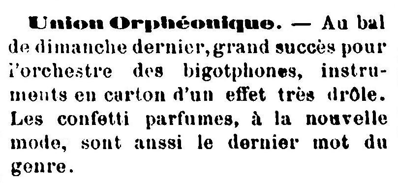 Article qui parle de l'Orchestre des Bigotphones d'Arcachon et aussi des confettis parfumés. L'Avenir d'Arcachon, n°2298, 38ème année, 12 janvier 1896, page 2, 2ème colonne.